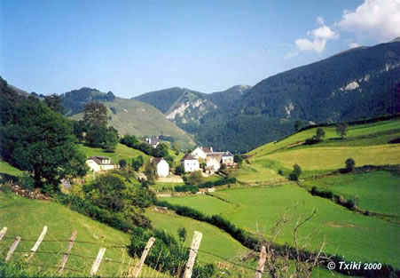 Vue du village de Licq-Atherey Pyrénées).